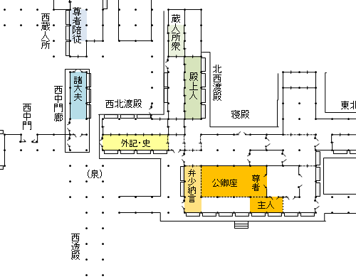 東三条殿・正月大饗（川本重雄復元図より作成）